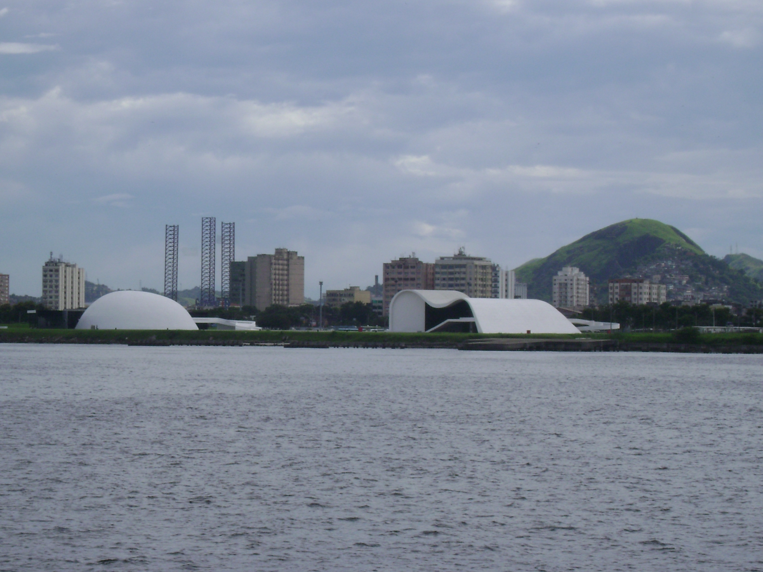 Edificações em Niterói, Rio de Janeiro, Brasil.